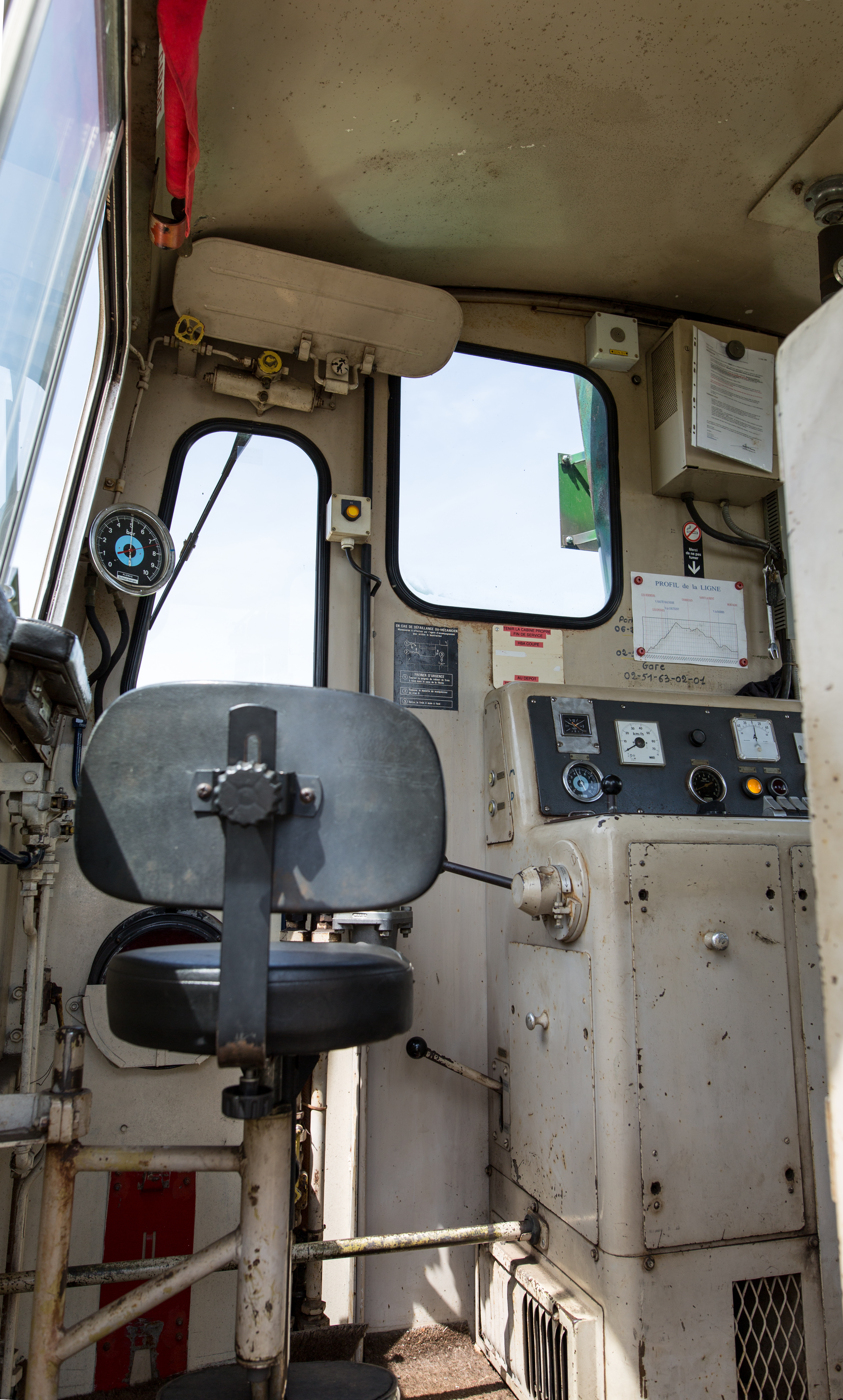 CFV Y 7771